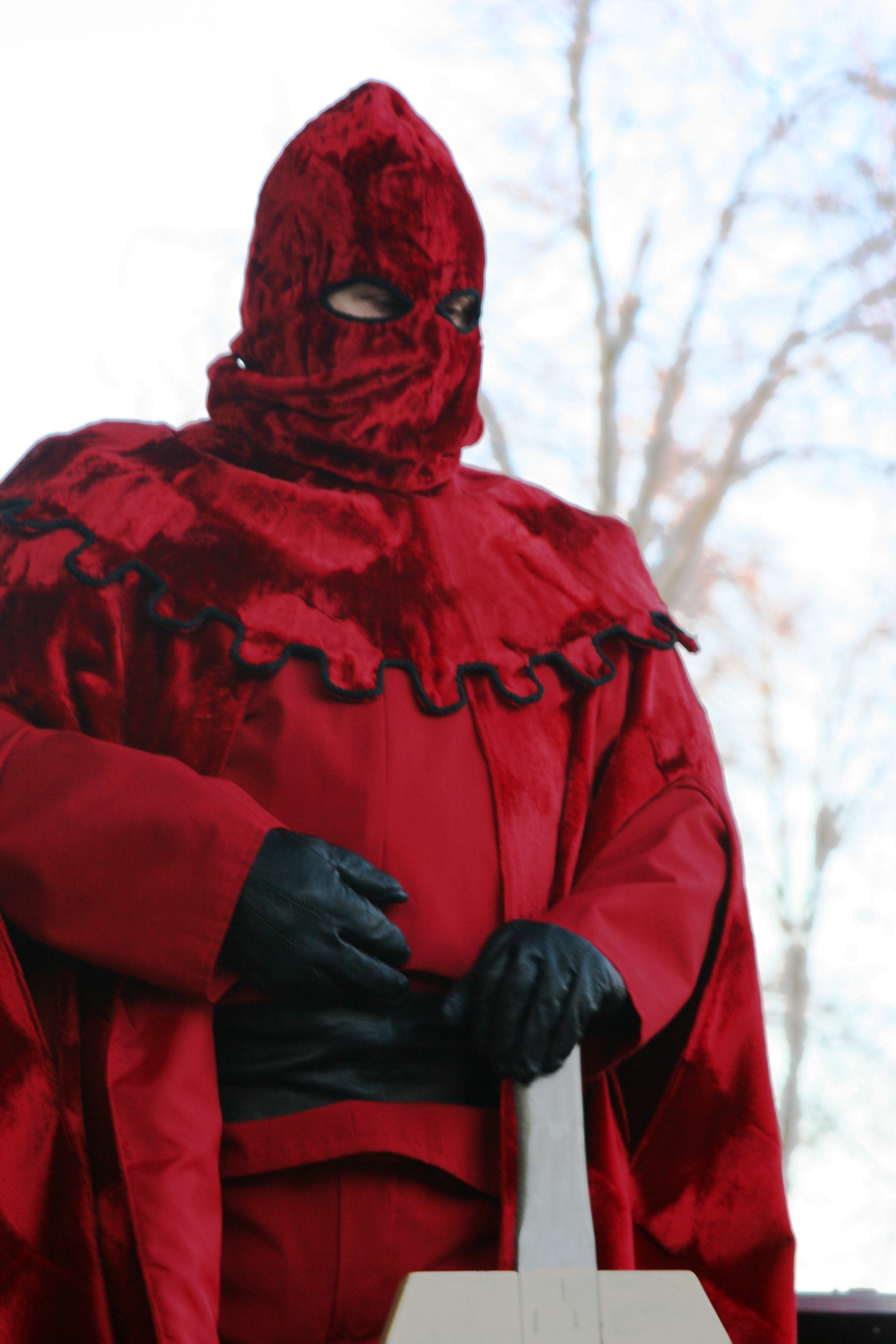 Postać z widowiska karnawałowego Ścięcie Śmierci w Jedlińsku